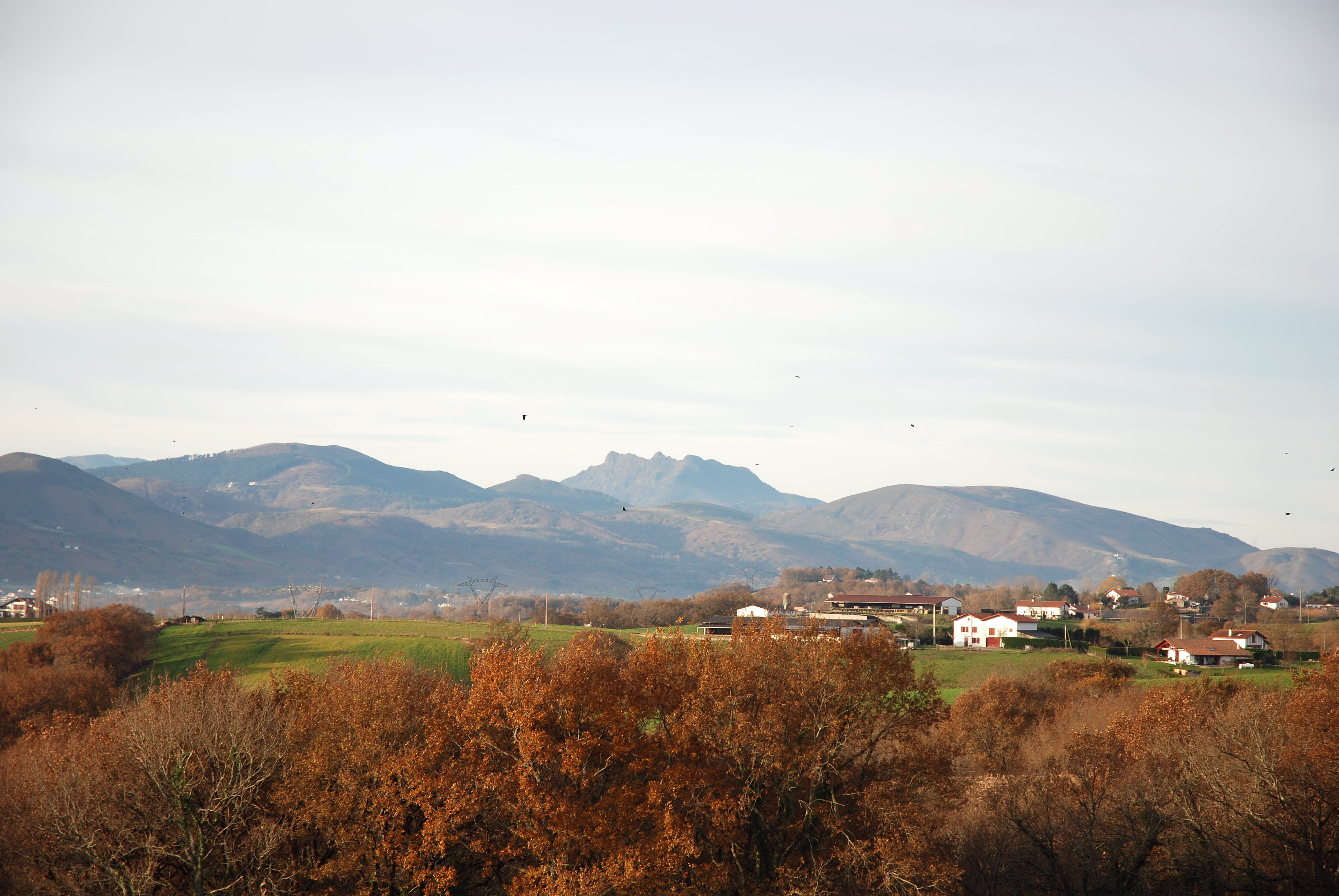 Les trois Couronnes vues d'Ahetze, photo prise le 31/12/06 par Harrieta171